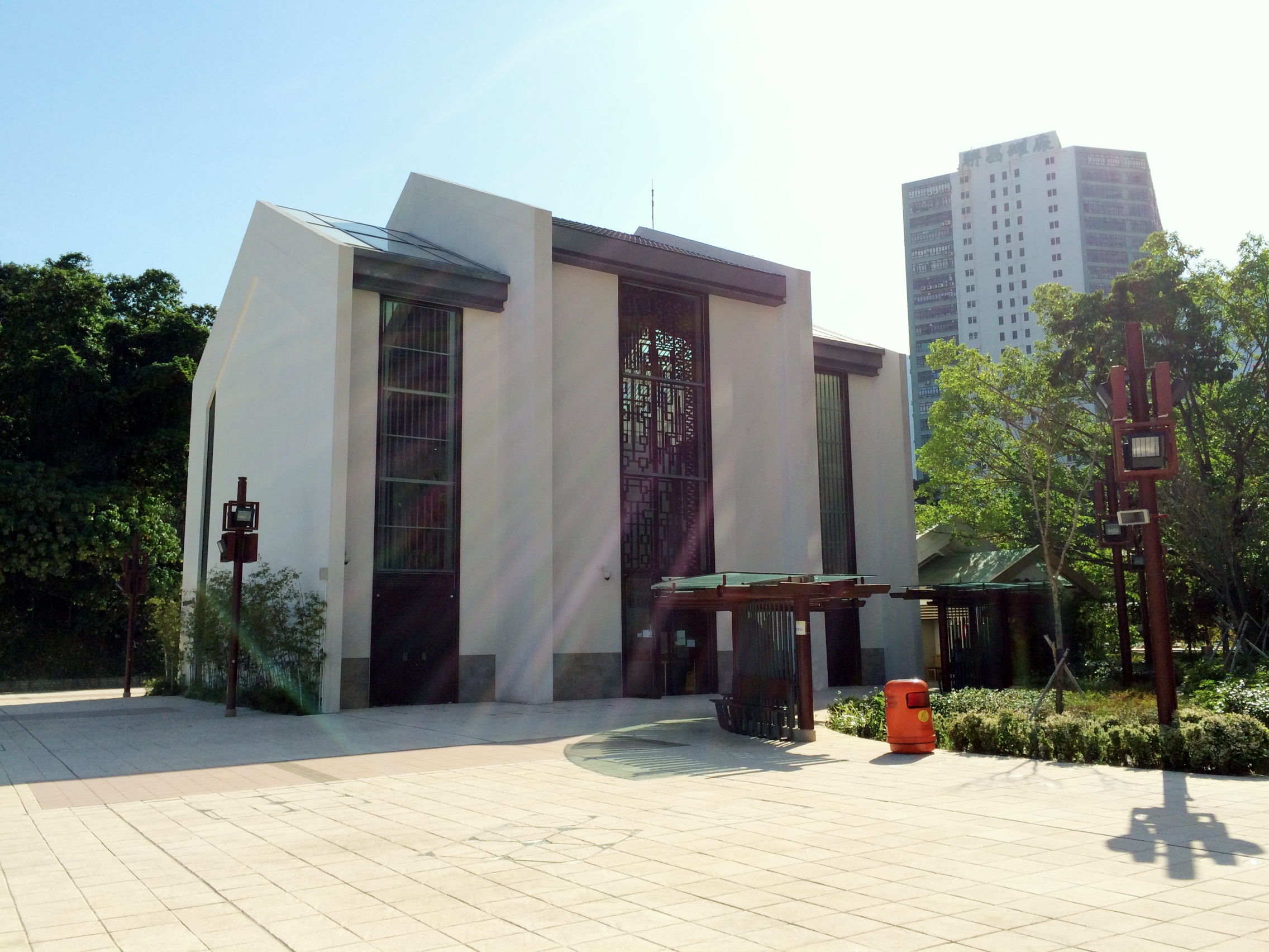 Tuen Mun Tin Hau Temple Square Pano